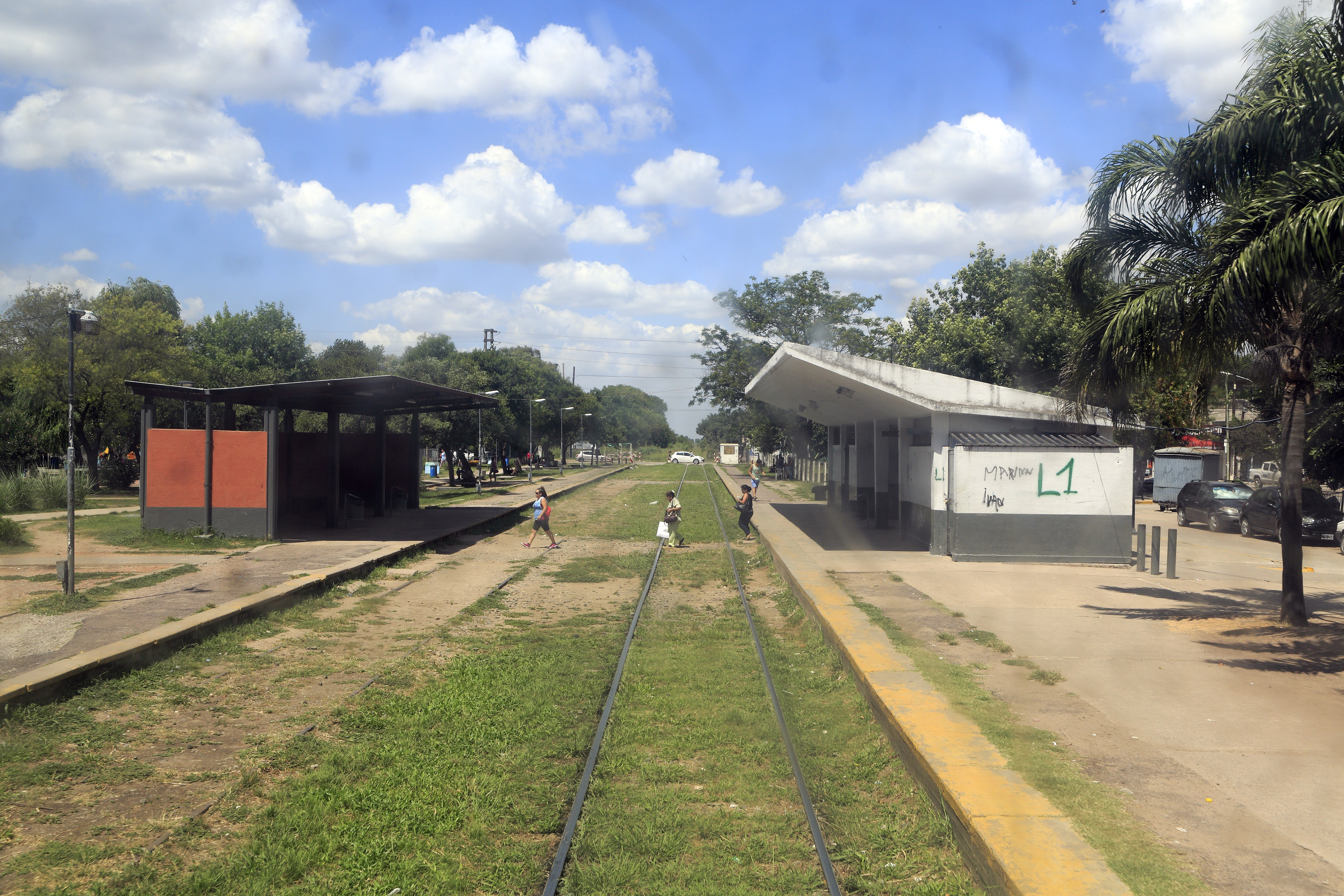 Einer der Kreuzungsbahnhöfe auf der Strecke GM-18 Victoria–Vagues des breitspurigen Systems Mitre, die bis Capilla del Señor zum Nahverkehr um Buenos Aires gehört, aber zustandsbedingt zum Aufnahmezeitpunkt nur noch bis Matheu befahren wird. Hier in Maquinista savio endet das praktisch durchgehend besiedelte Gebiet, wobei die Besiedelungsdichte allerdings durch die Einfamilienhausbebauung im Vergleich sehr gering ist. Der Bahnhof wird nicht mehr planmäßig für Zugkreuzungen genutzt, das Überholungsgleis ist schon länger nicht befahren worden.Richtung Victoria (Buenos Aires)